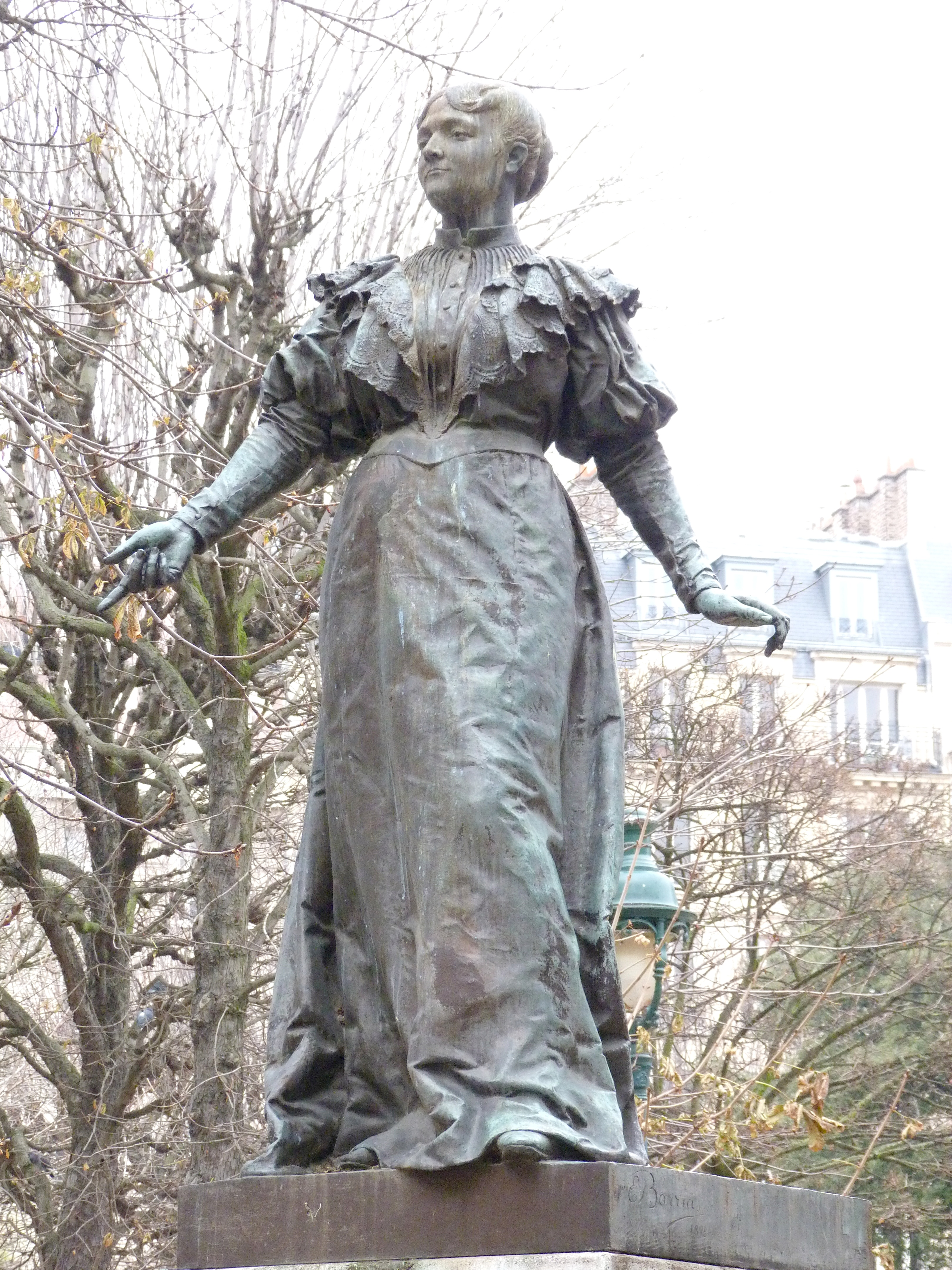 Louis-Ernest Barrias, bronze, statue de Maria Deraismes (1826-1894), square des Épinettes, Paris (17e arrond.) - La statue originale fut installée en 1898, fondue en en 1942 par l'occupant allemand, reproduite et ré-installée en 1983.